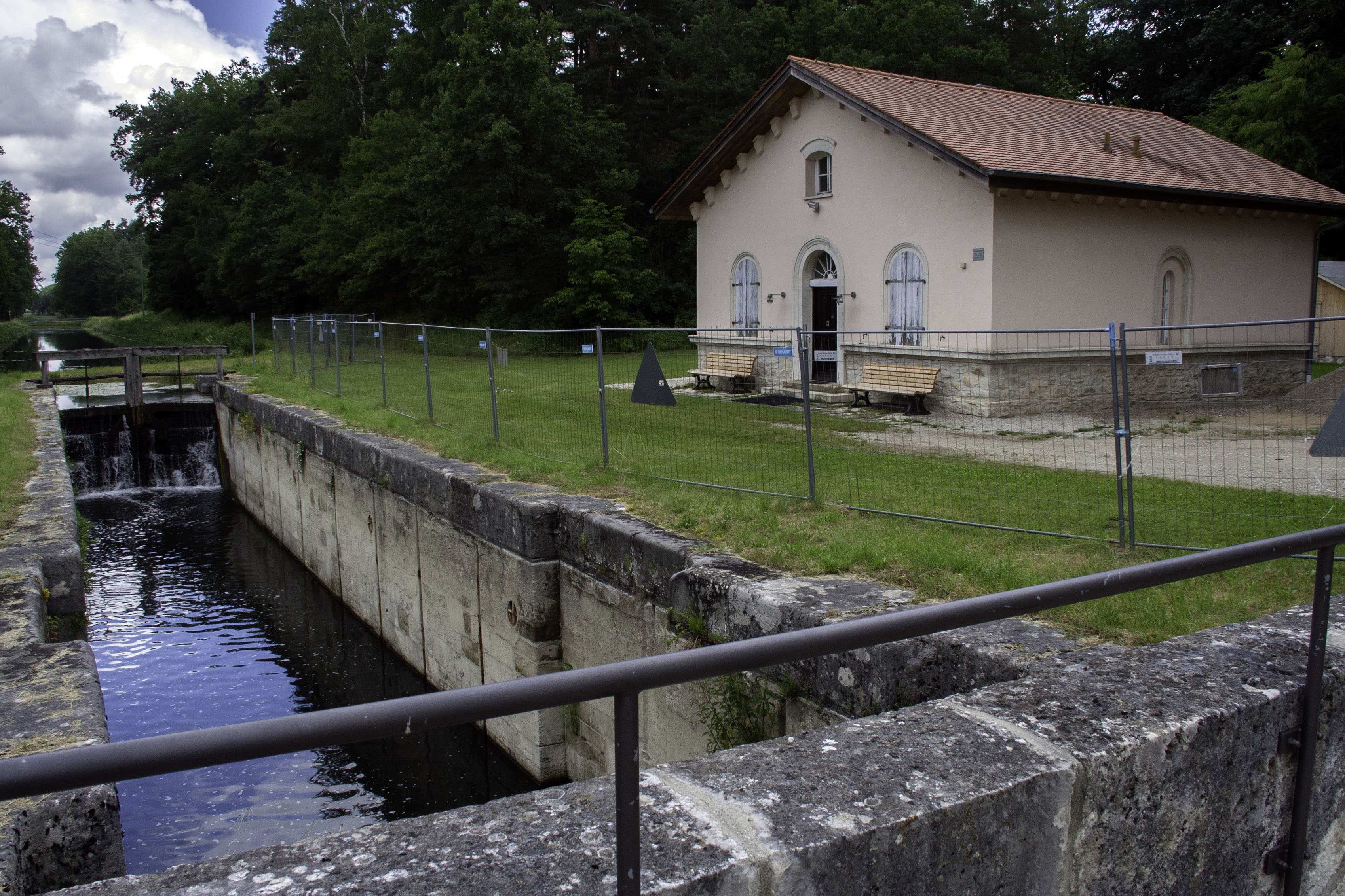 Schleuse 30, Ludwig-Donau-Main-Kanal